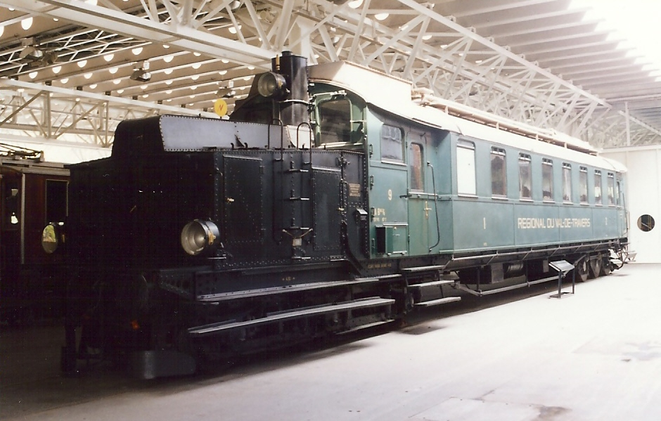 Dieseltriebwagen BCm 2/5 Nummer 9 der RVT, Baujahr 1914 im VHS Luzern ausgestellt